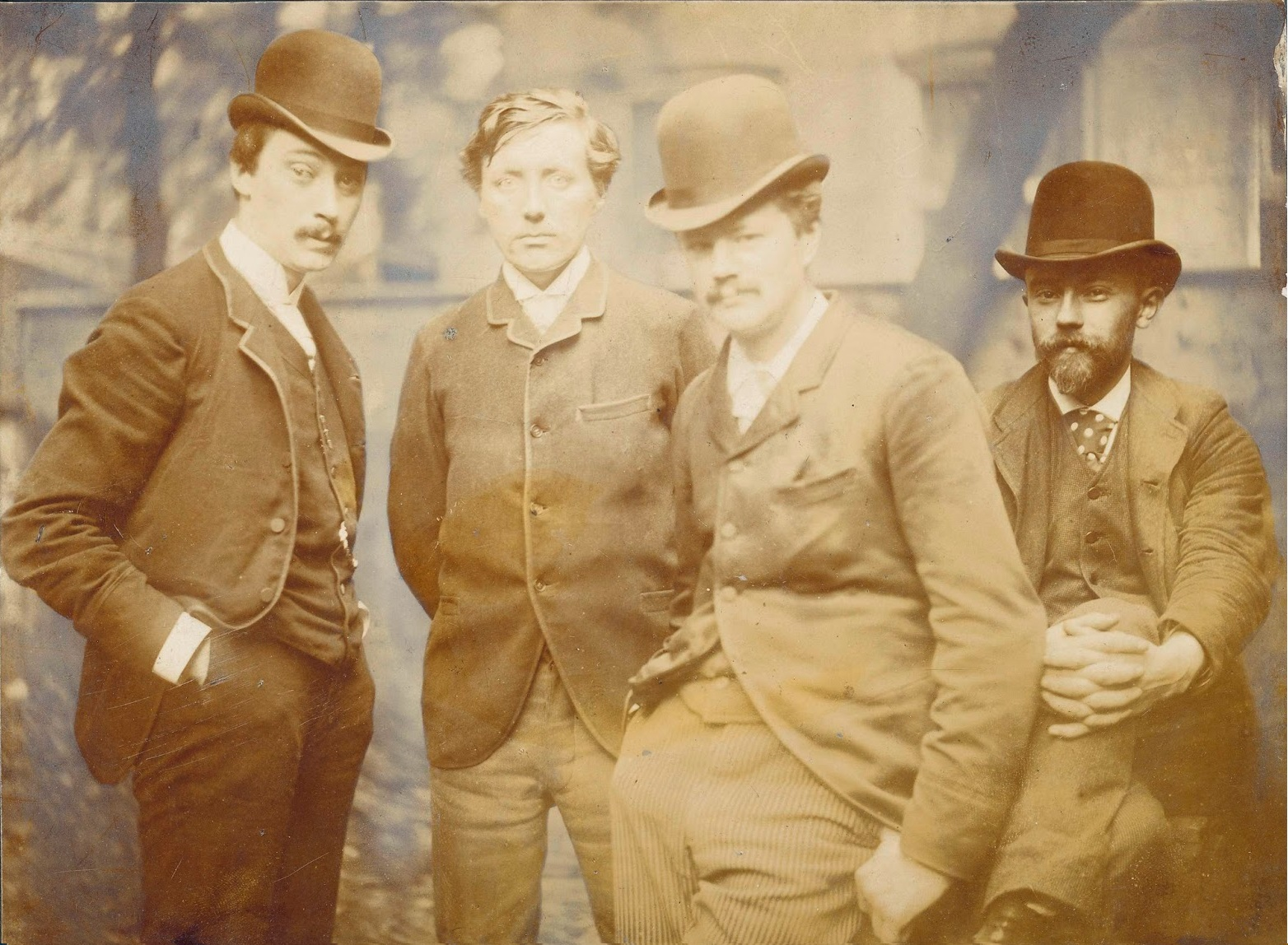 Kunstenaarsportretten ('Tachtigers; . Vlnr: Willem Witsen, Willem Kloos, Hein Boeken en Maurits van der Valk).